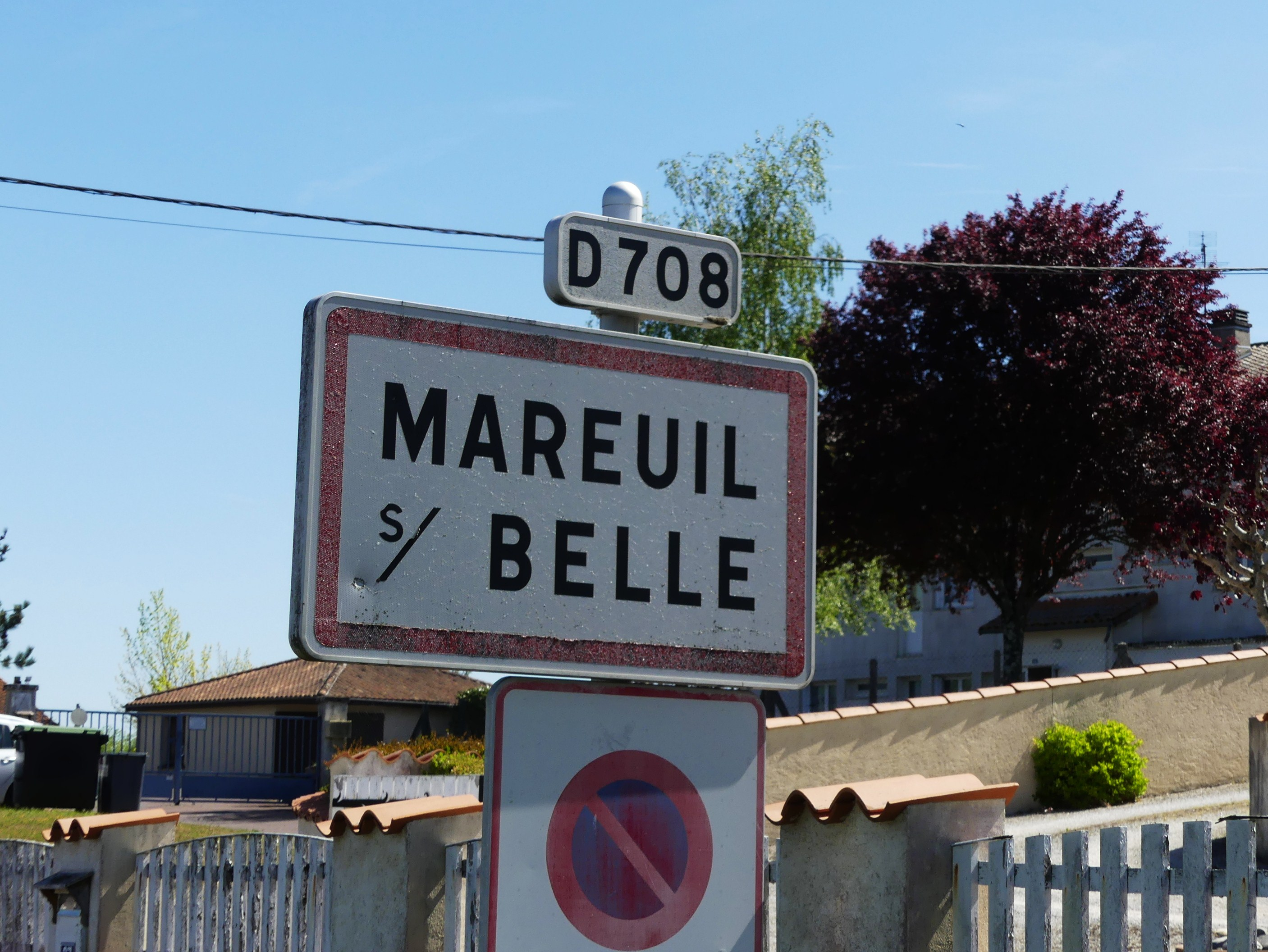 Panneau d'entrée à Mareuil, Dordogne, France.